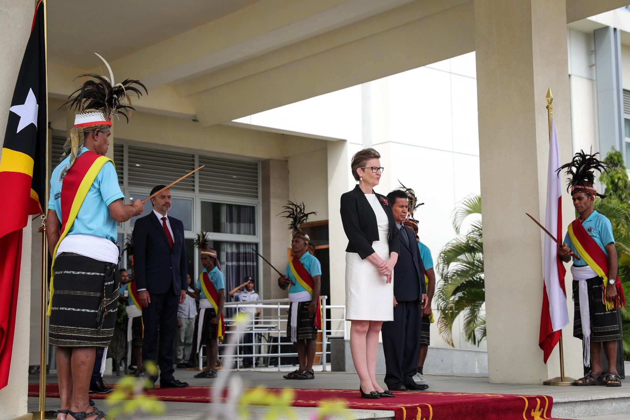 Präsident Francisco Guterres nimmt die Akkreditierung der neuen Botschafter in Osttimor entgegen: Finnland: Jari Sinkari Vereinigtes Königreich: Owen John Jenkins Polen: Beata Stoczynski Tetun: Prezidente Repúblika Francisco Guterres Lú Olo, ohin, simu karta kredensiál husi Embaixadór Finlandia, Jari Sinkari, Embaixadór Reinu Unidu, Owen John Jenkins, no Embaixadora Polónia, Beata Stoczynski atu hametin liután kooperasaun no amizade ho Timor-Leste.